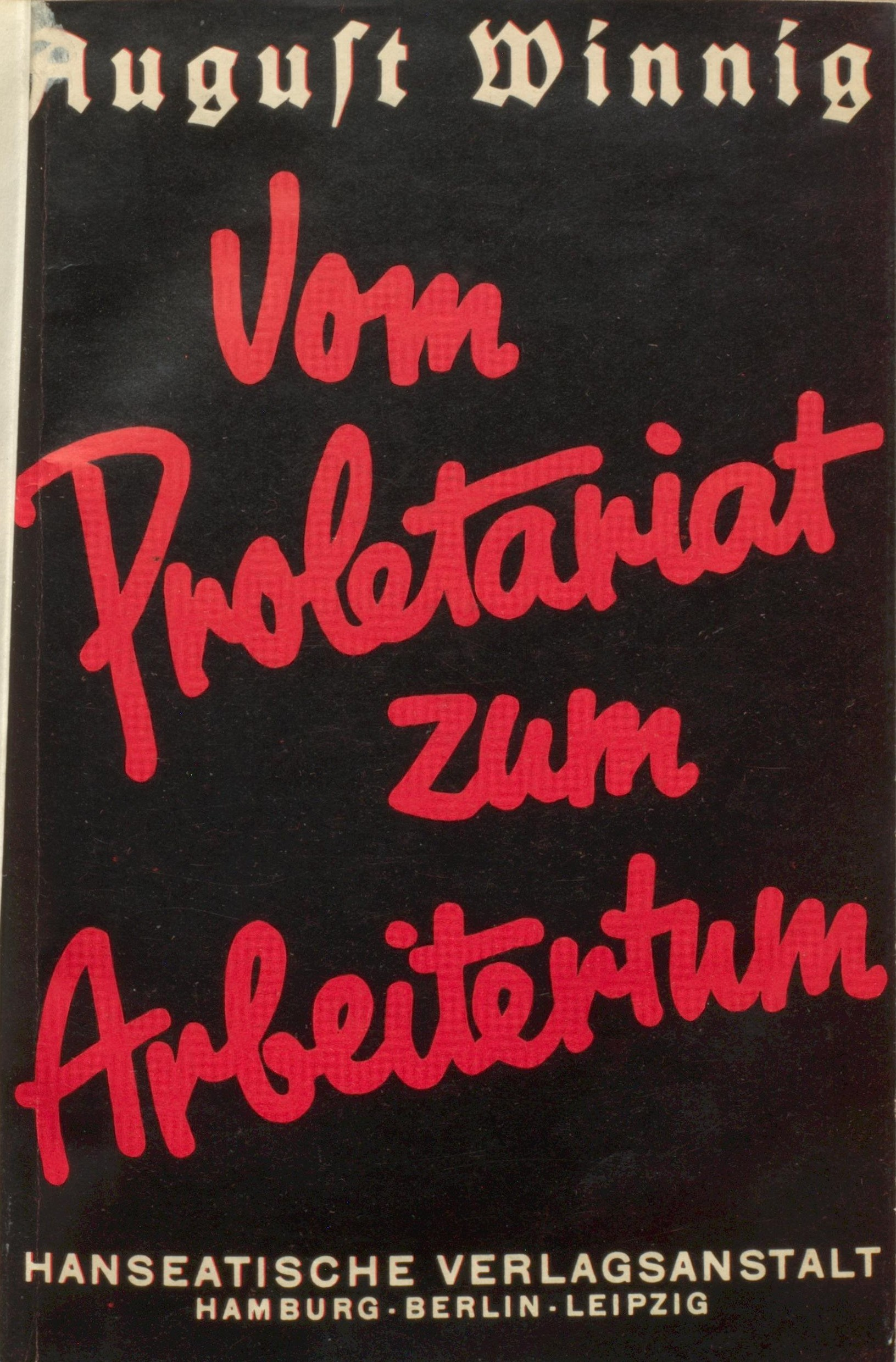 August Winnig Vom Proletariat zum Arbeitertum 1930 Umschlag